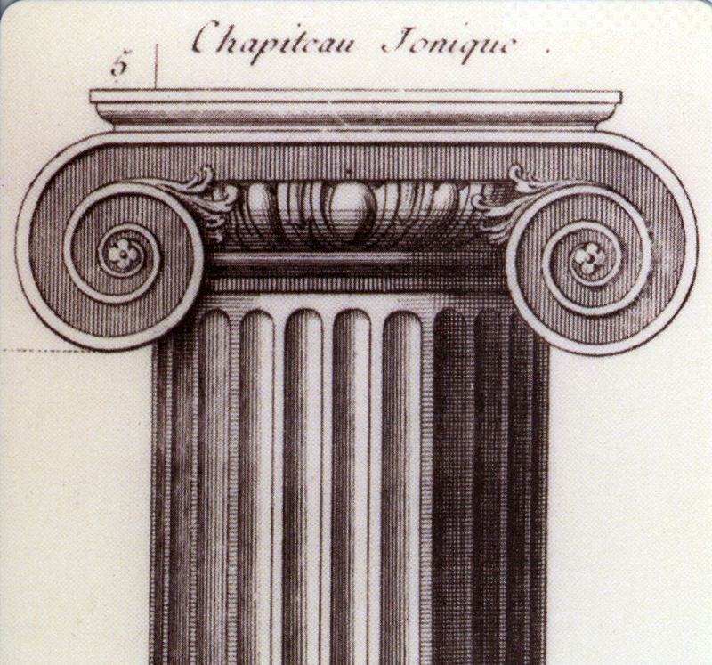 Jonisk Kapitel